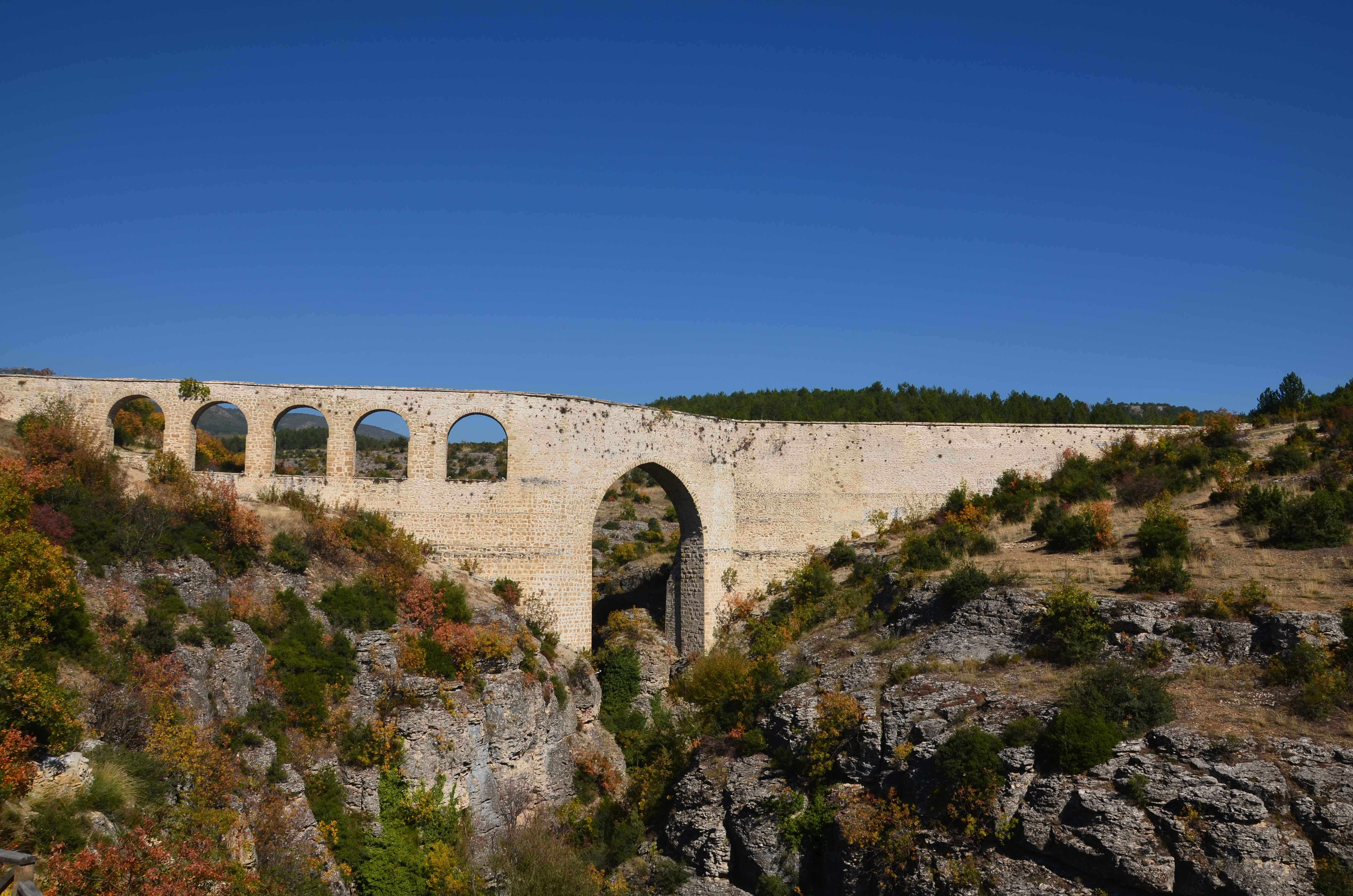 İncekaya Su kemeri (2013)